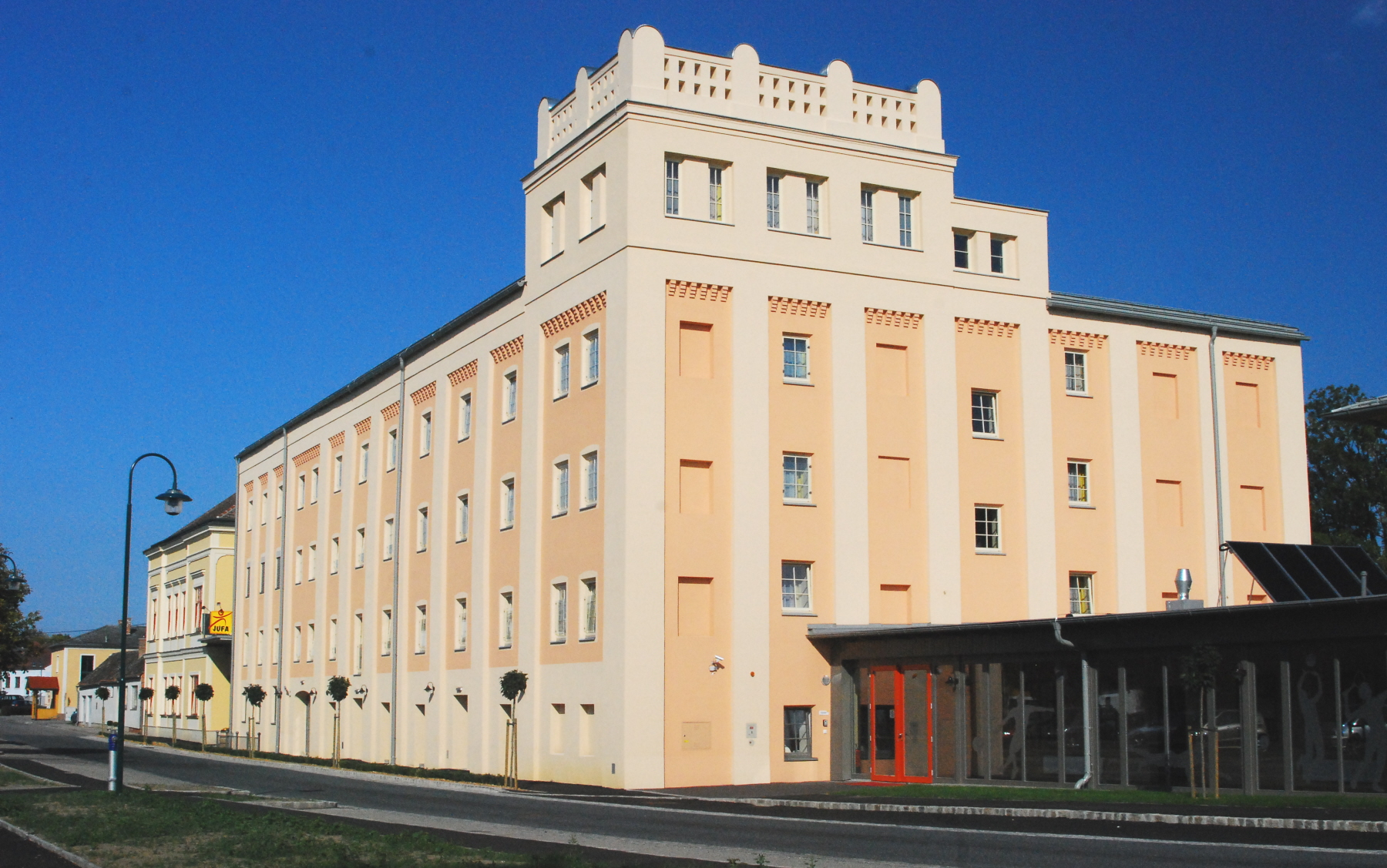 Schustermühle